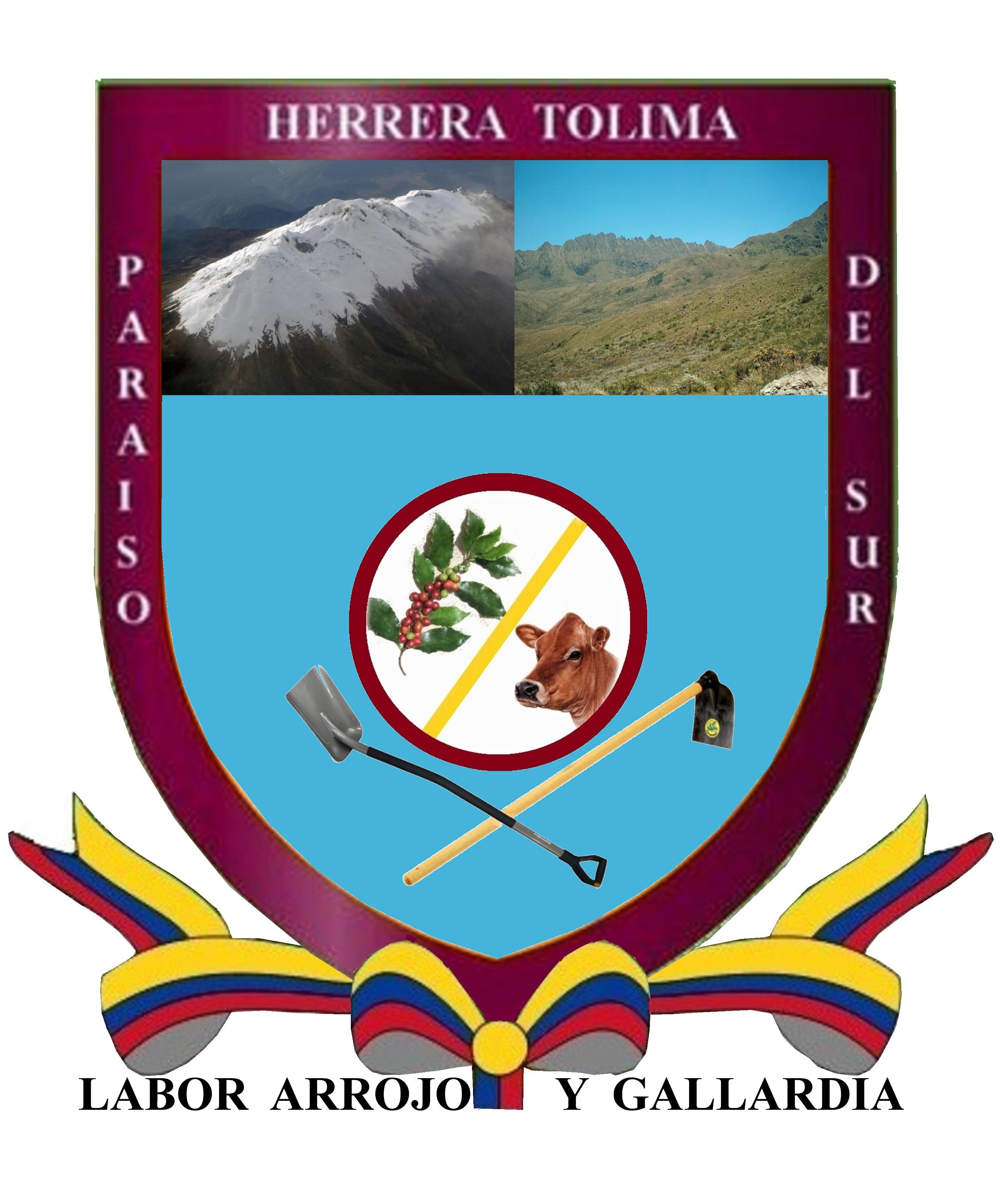 ESCUDO MODERNO DE HERRERA TOLIMA.